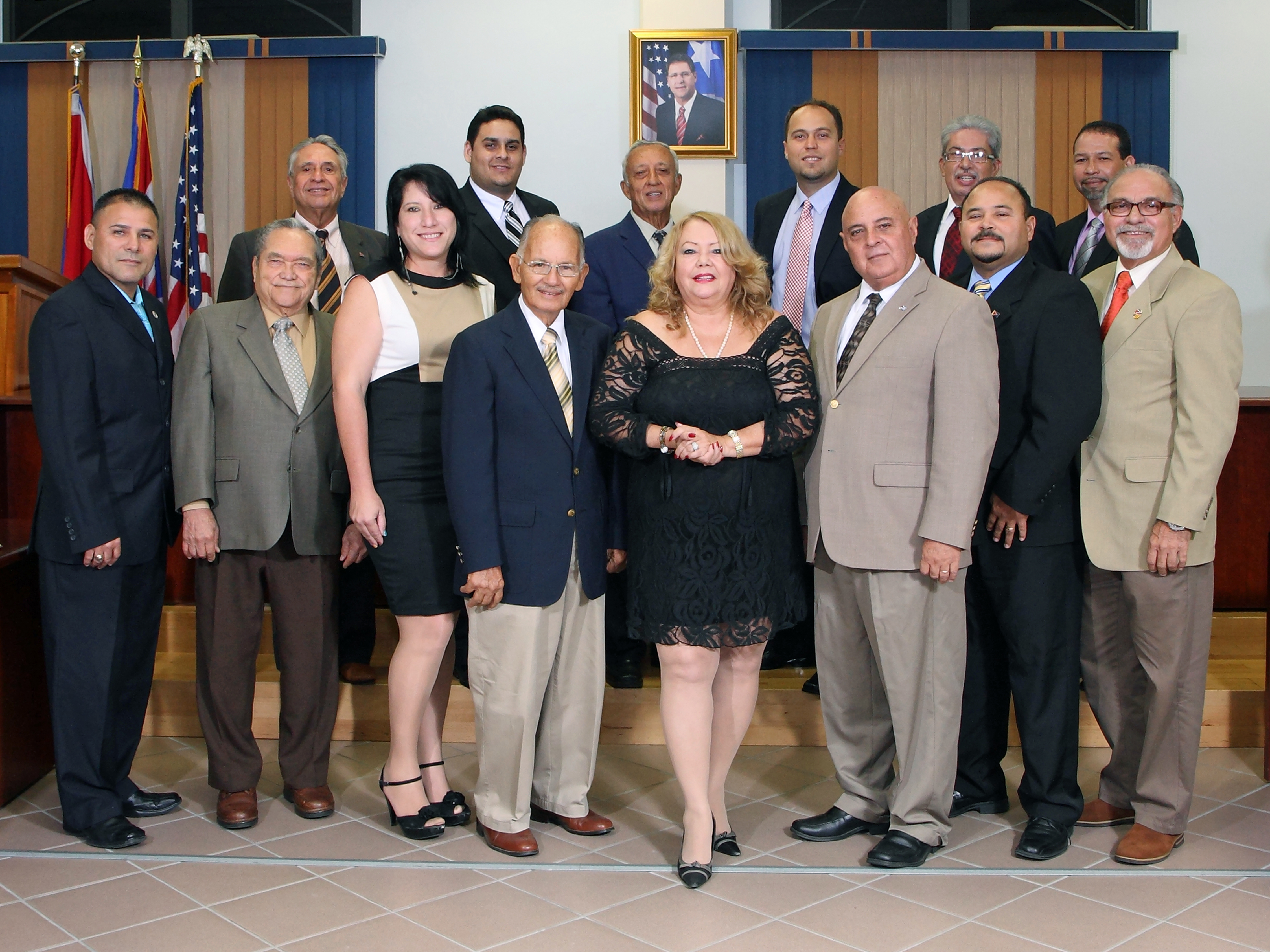 Honorable Legislatura Municipal